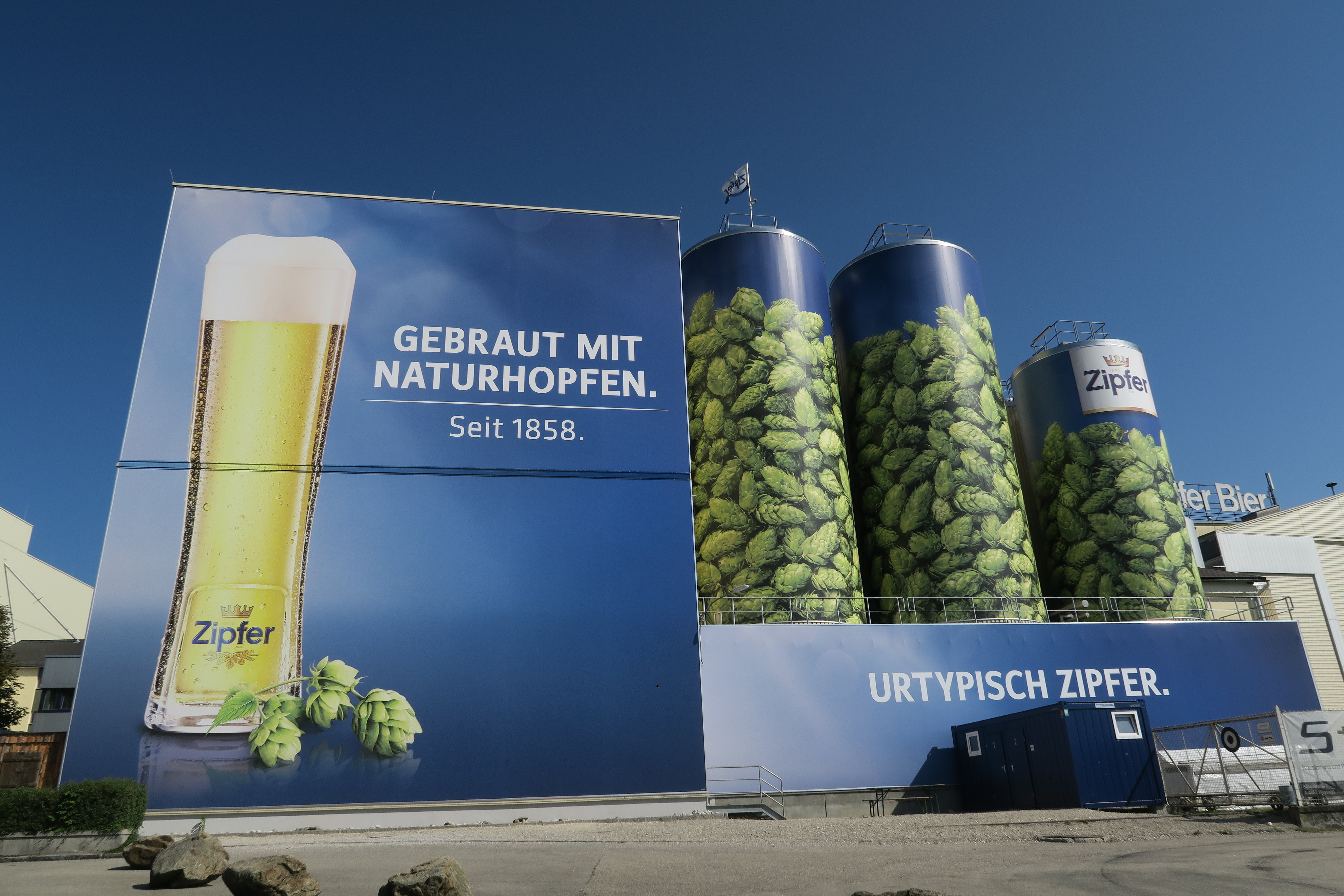 Außenansicht der Brauerei Zipf